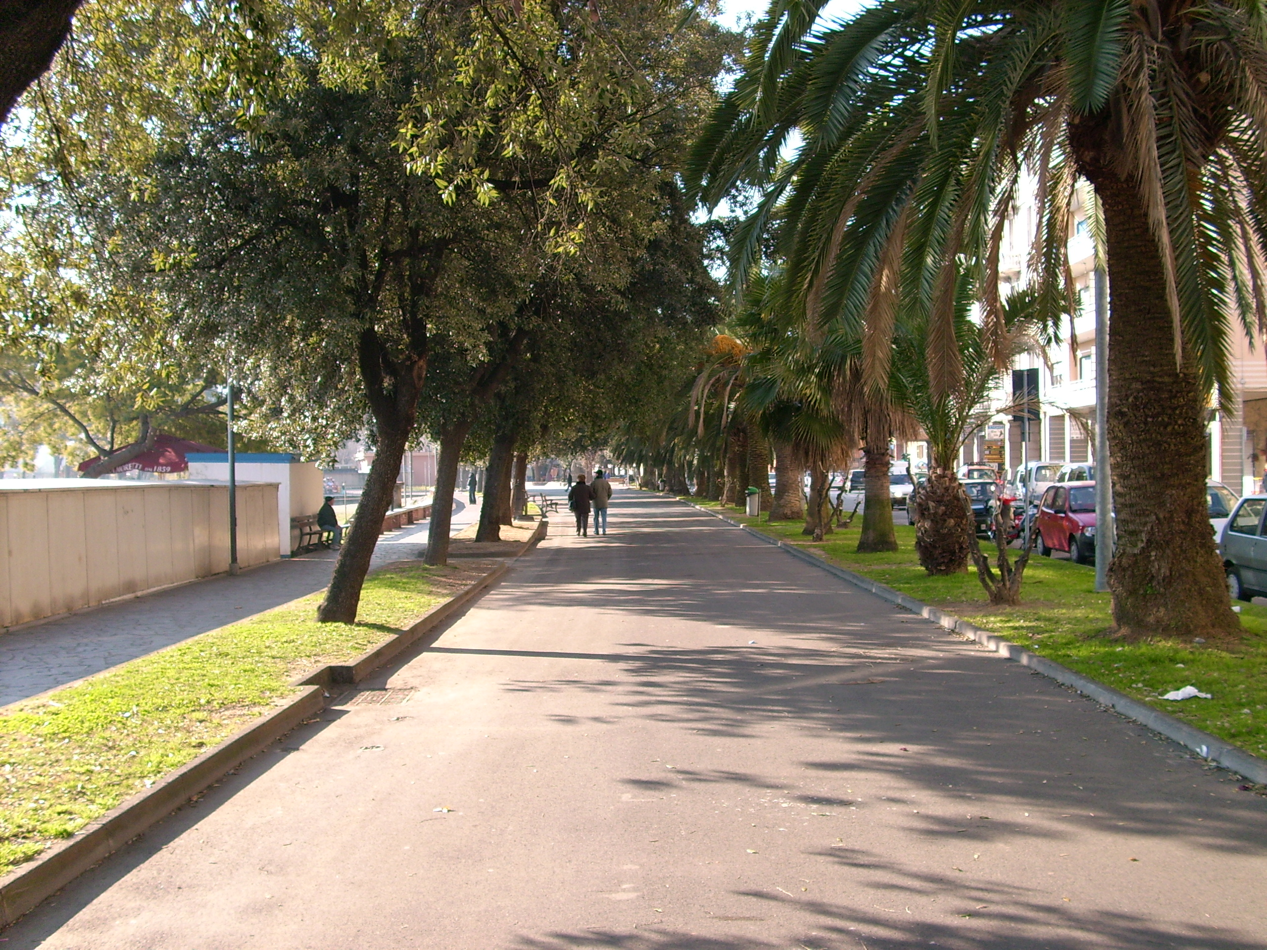 Lungomare di Vado Ligure, Liguria, Italy